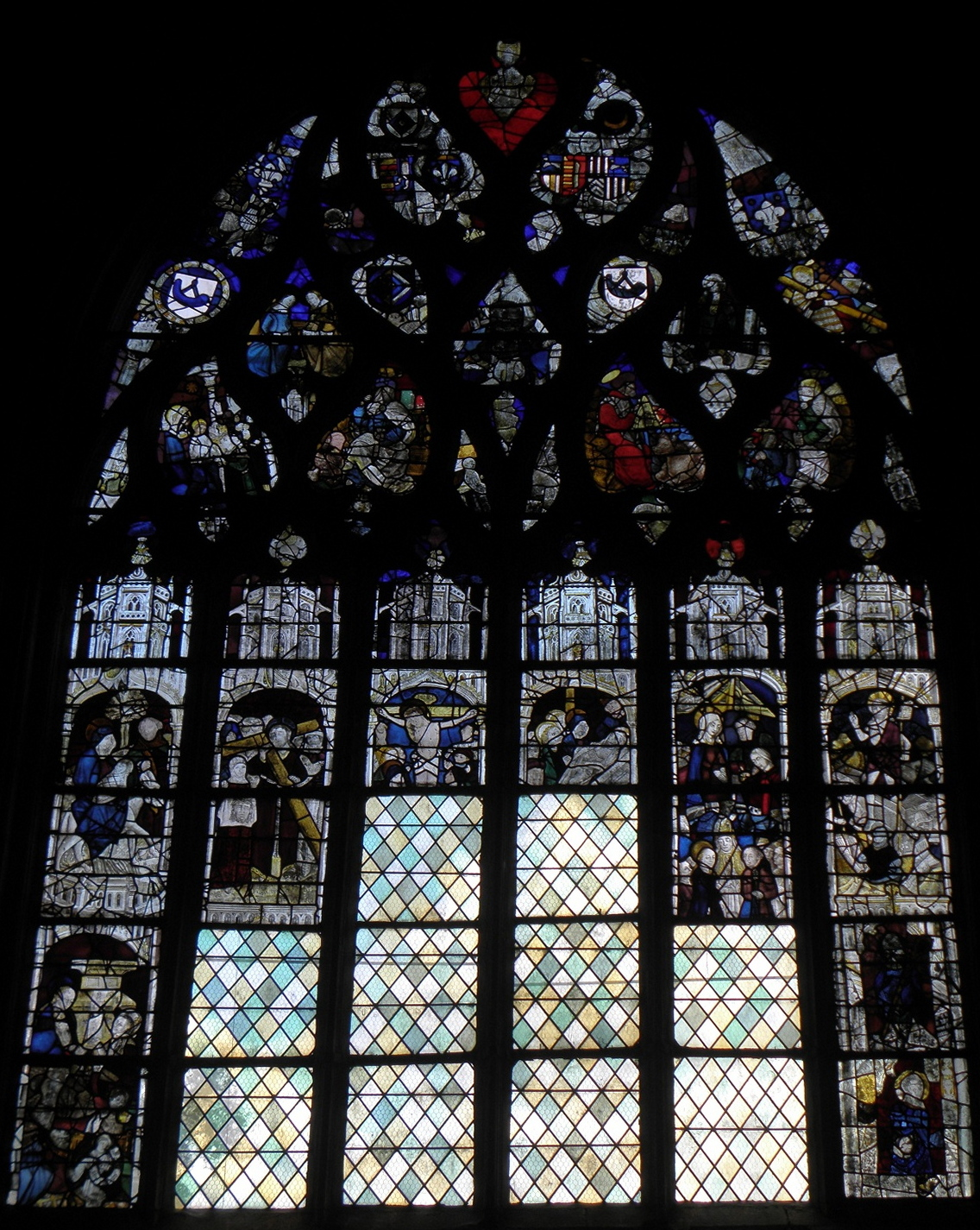 Maîtresse vitre de la chapelle Notre-Dame de Kerdévot en Ergué-Gabéric (29).